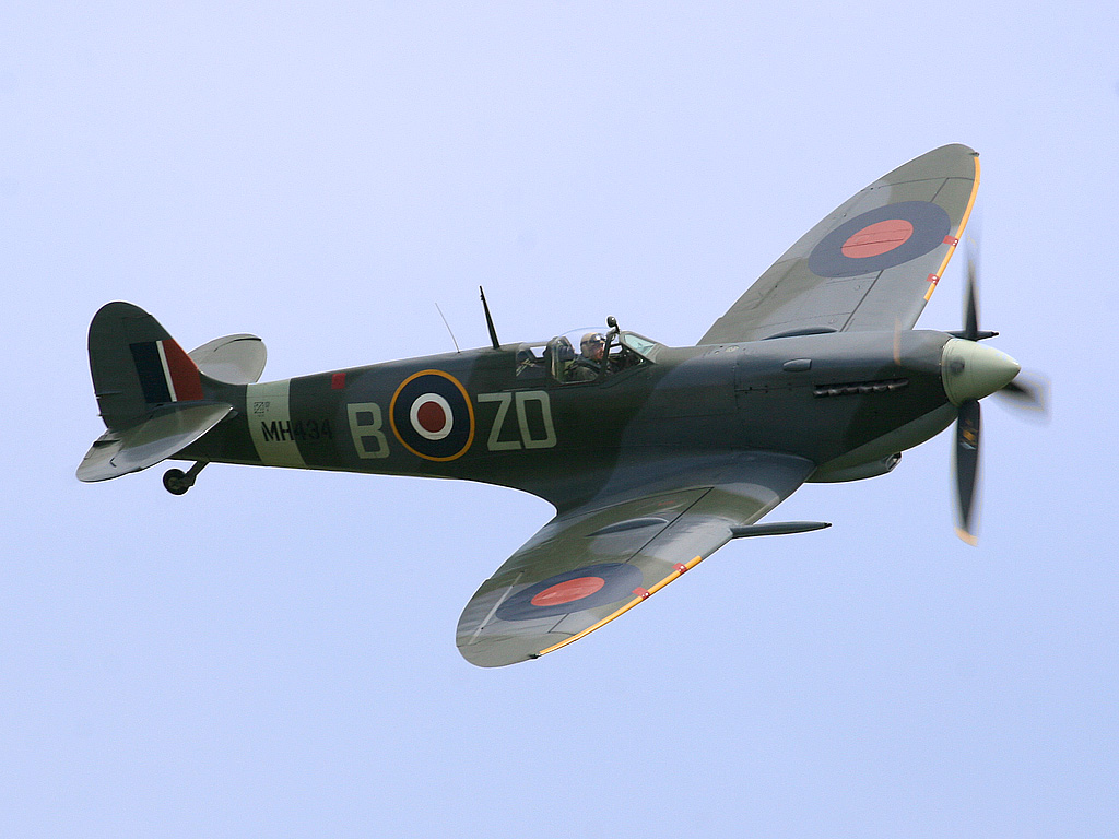 Ray Hanna aux commandes du Spitfire MH434 lors du Flying Legends de fr:2005 Auteur : Franck Cabrol Licence : GNU/GFDL Permissions transmise à permissions(AT) le 09/10/2006 Autorisation-OTRS-GFDL otrs 2006100910006804 Franck Cabrol